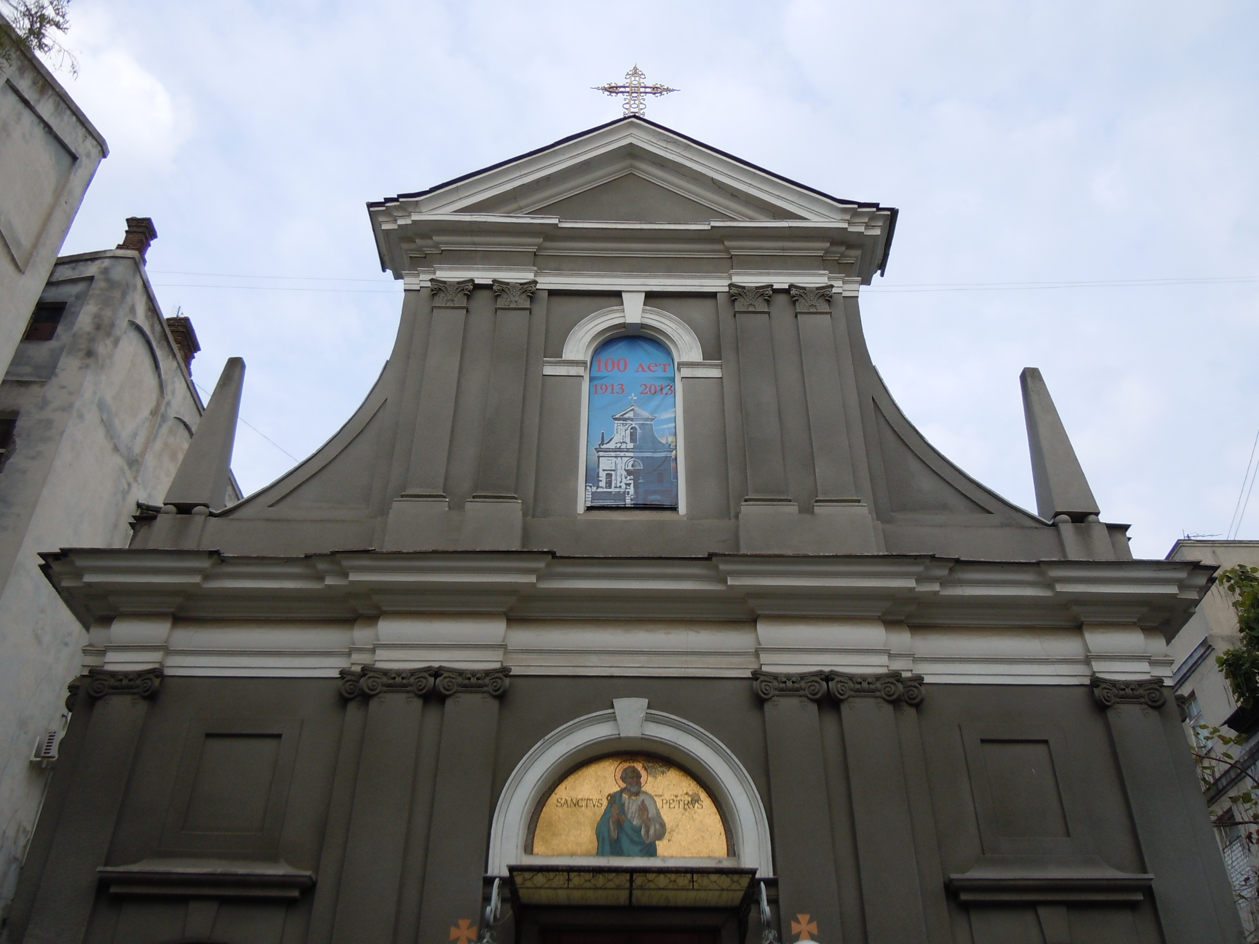 Костьол св. Петра, Одеса, Гаванна вул., 5